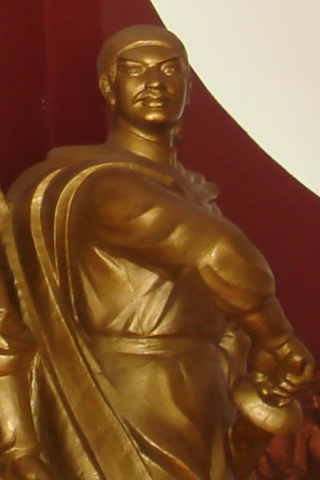 Tượng Nguyễn Lữ trong bảo tàng Quang Trung